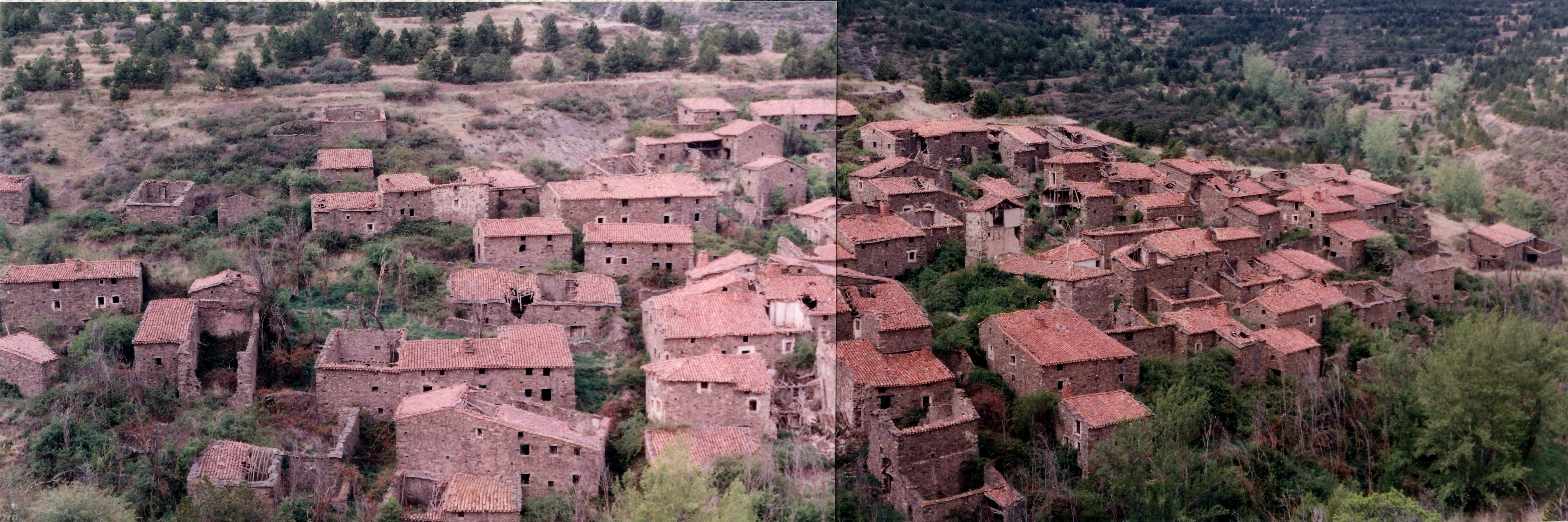 Fuentebella. Vista general 12